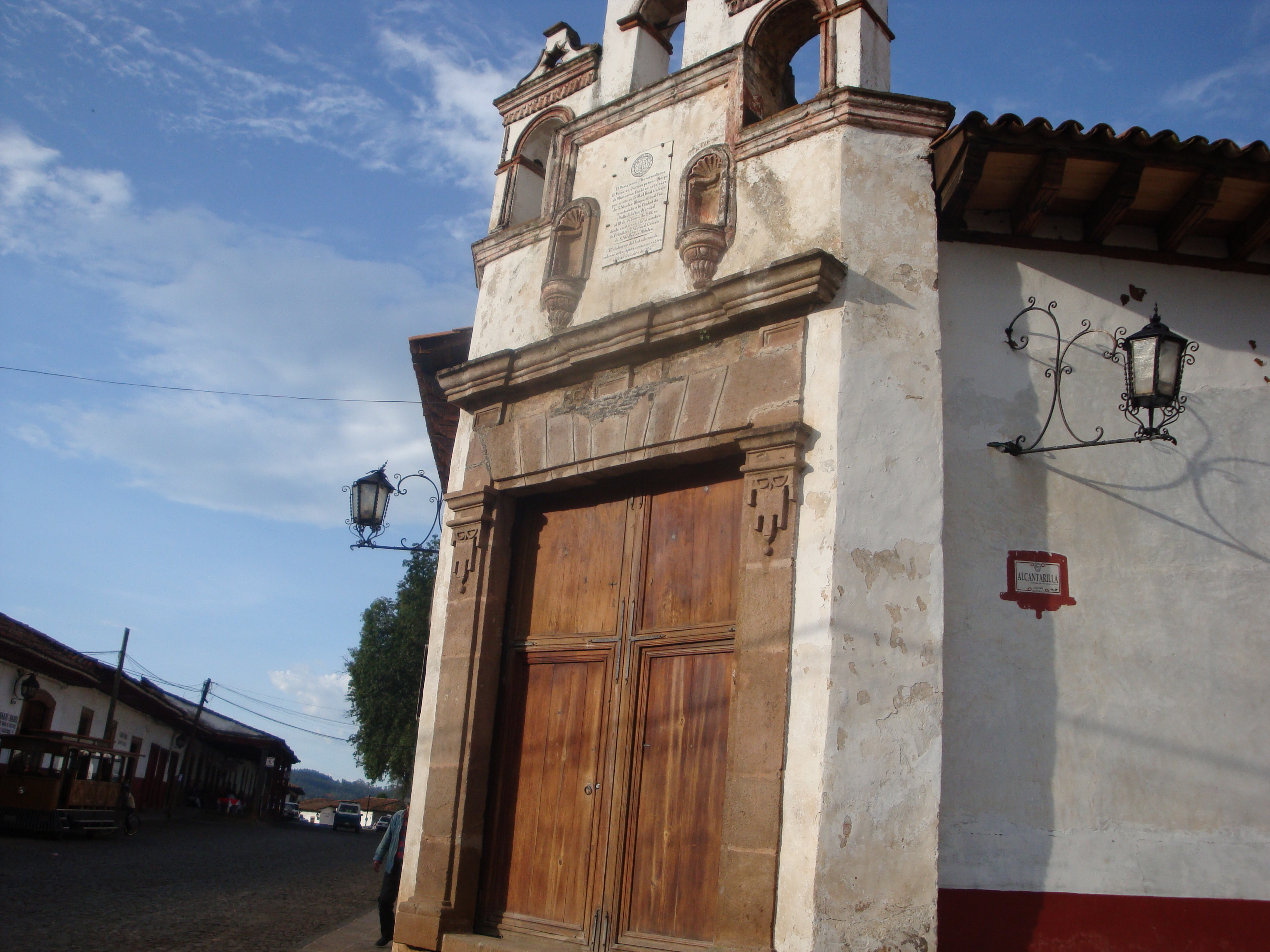 Museo Pátzcuaro Michoacan